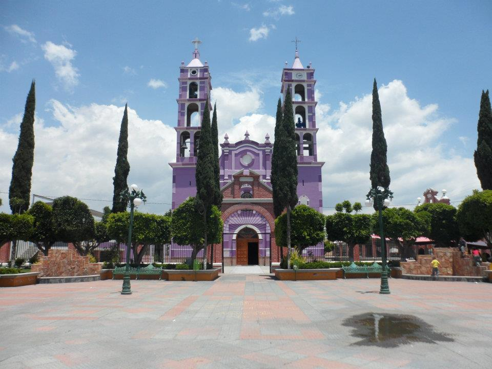 La Parroquia Jesús de las Maravillas es sede de diversos acontecimientos religiosos, y uno de los edificios más representativos de la ciudad, no sólo por sus torres, sino porque tiene una gran historia.